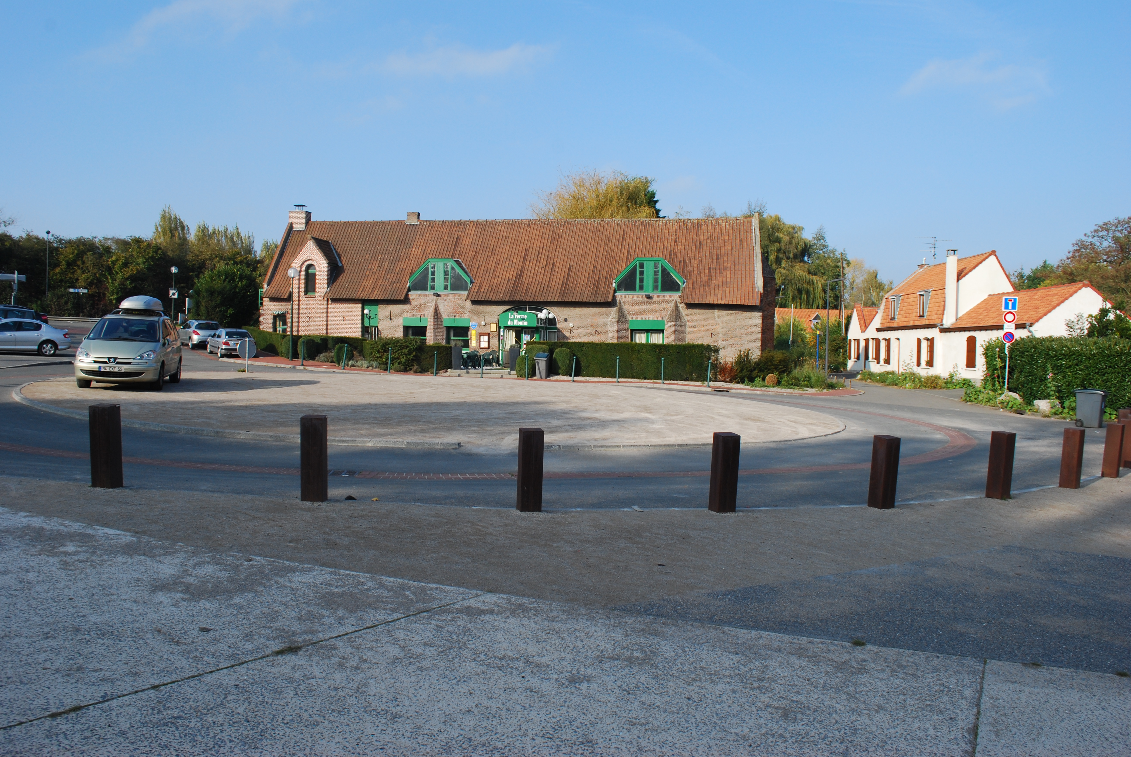 Vue des abords du LaM (Musée d'Art moderne, d'Art contemporain et d'Art brut, Lille métropole).